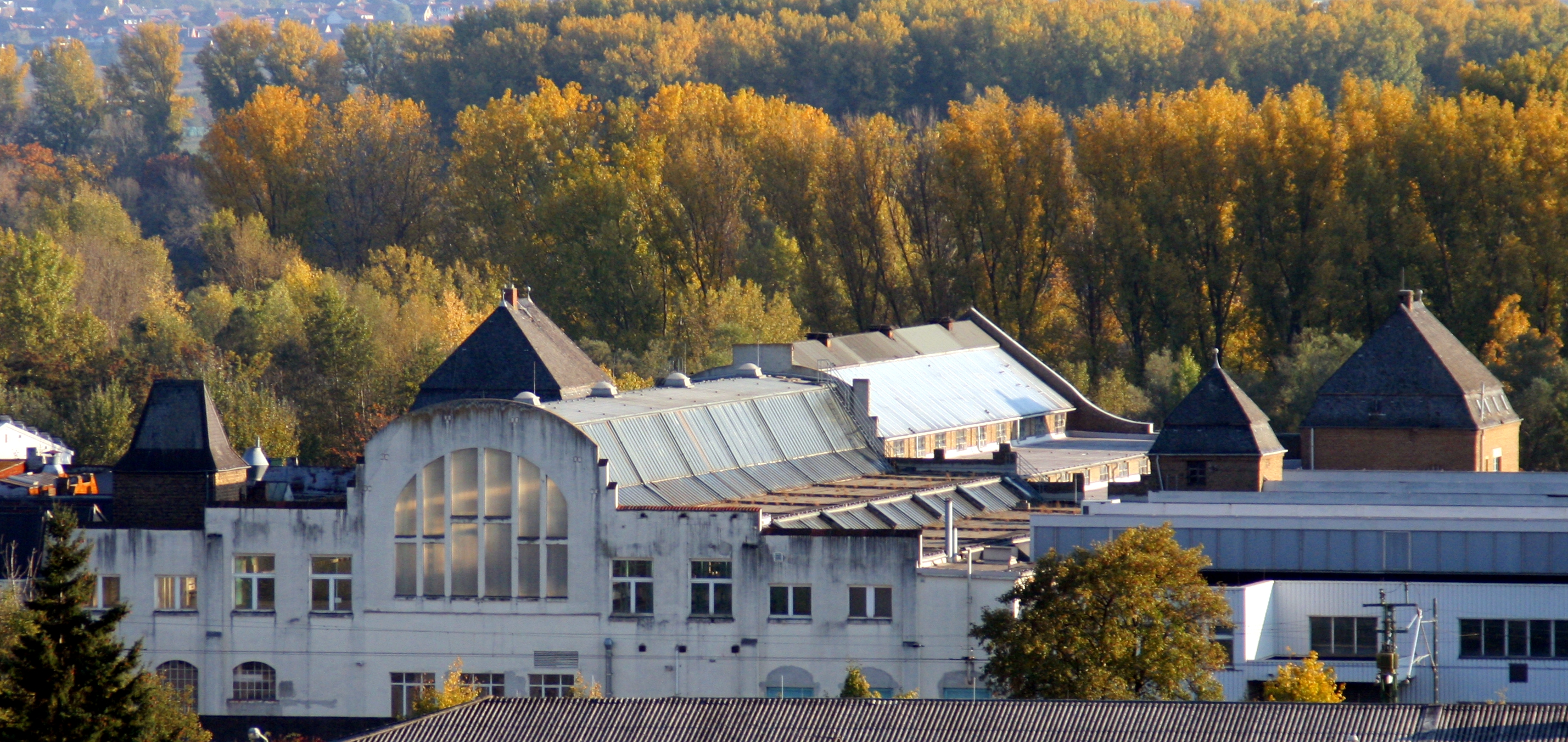 Alte Werkshalle in Geisenheim, Sicht von Norden